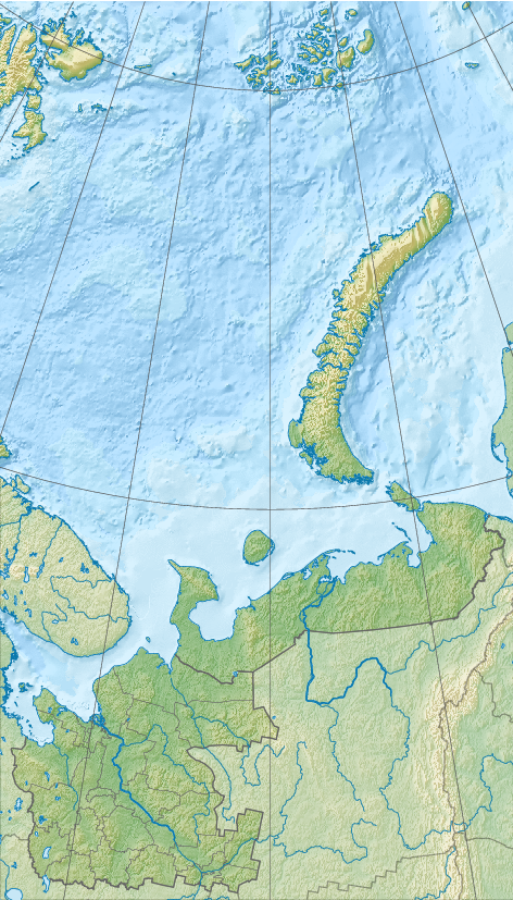 Физическая карта Архангельской области, включая Ненецкий автономный округ, Новая Земля, Земля Франца-Иосифа. Проекция: Equidistant conic projection Проекция и координаты для GMT: -JD50/65/60/75/8 -R37/60/85.8/80.4r Инструменты: GMT, Inkscape This map may be incomplete, and may contain errors. Don't rely solely on it for navigation.